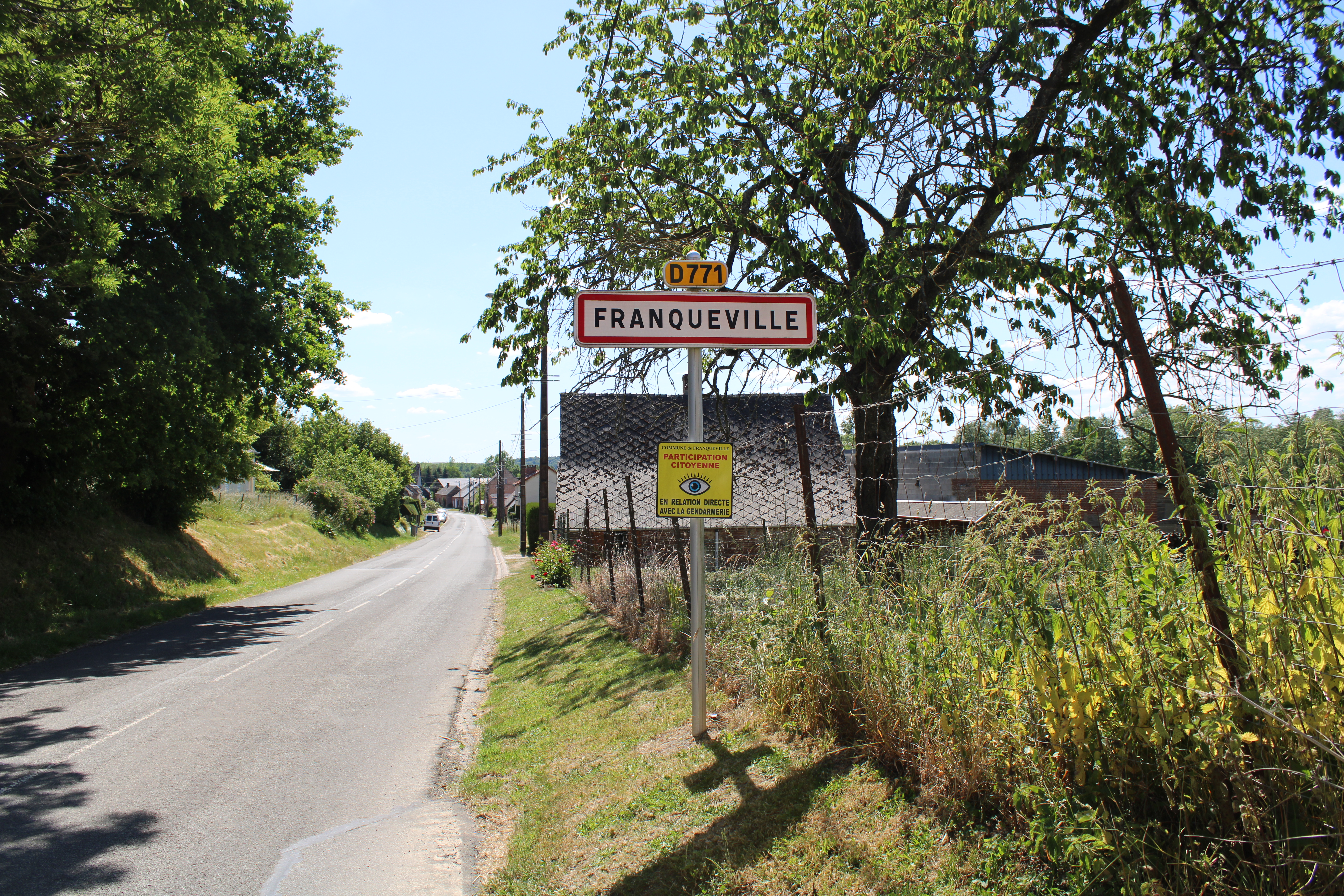 Entrée du village